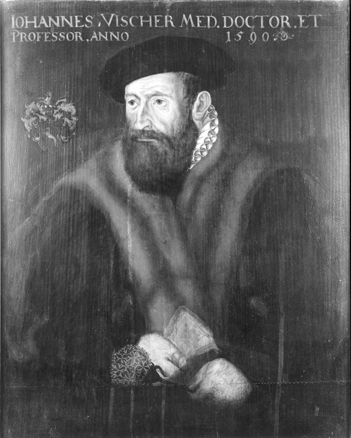 Johannes Vischer; Gemälde der Professorengalerie der Eberhard Karls Universität Tübingen; Öl auf Holz, 59,5 cm x 47 cm